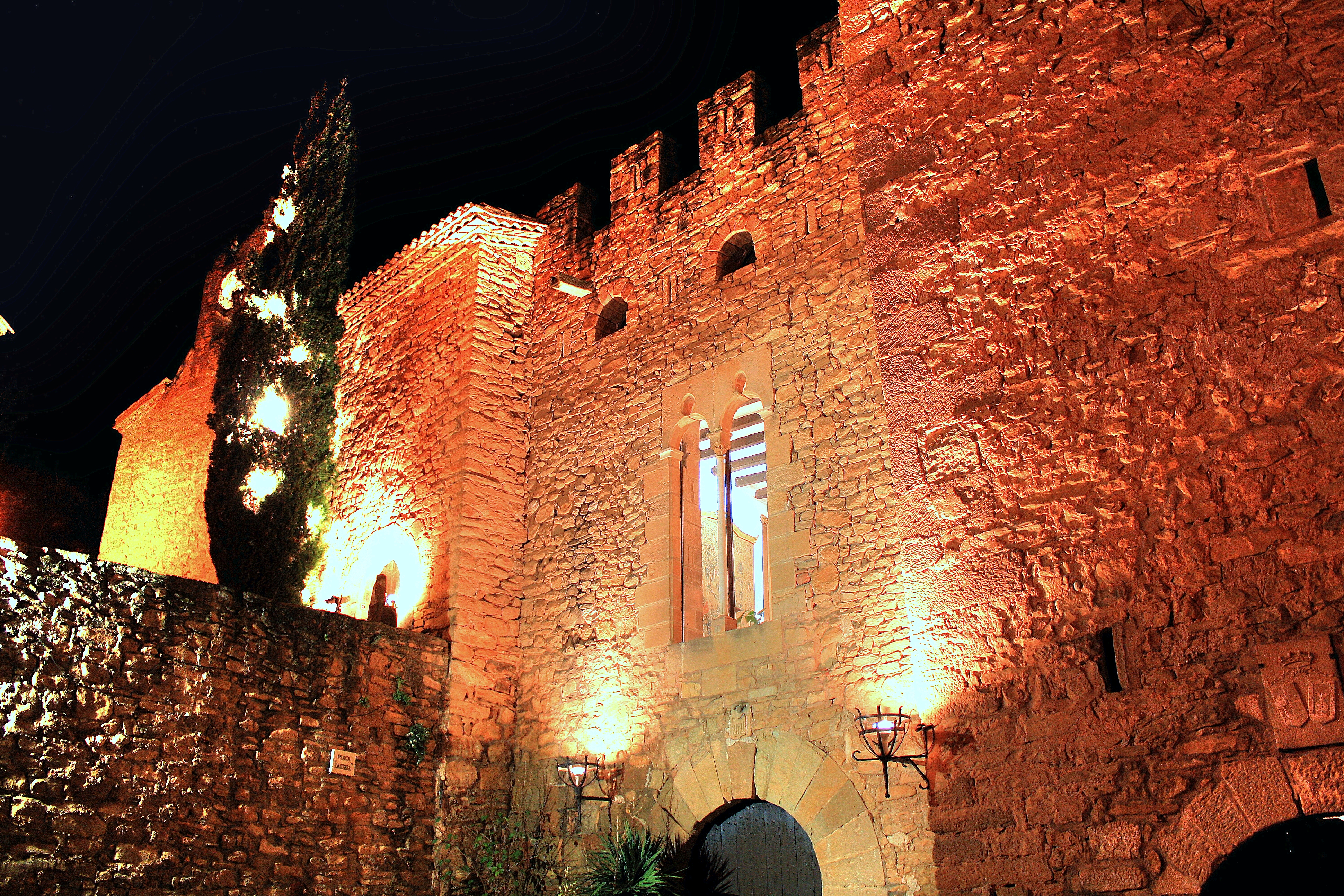 Castell de Montsonís (Foradada)